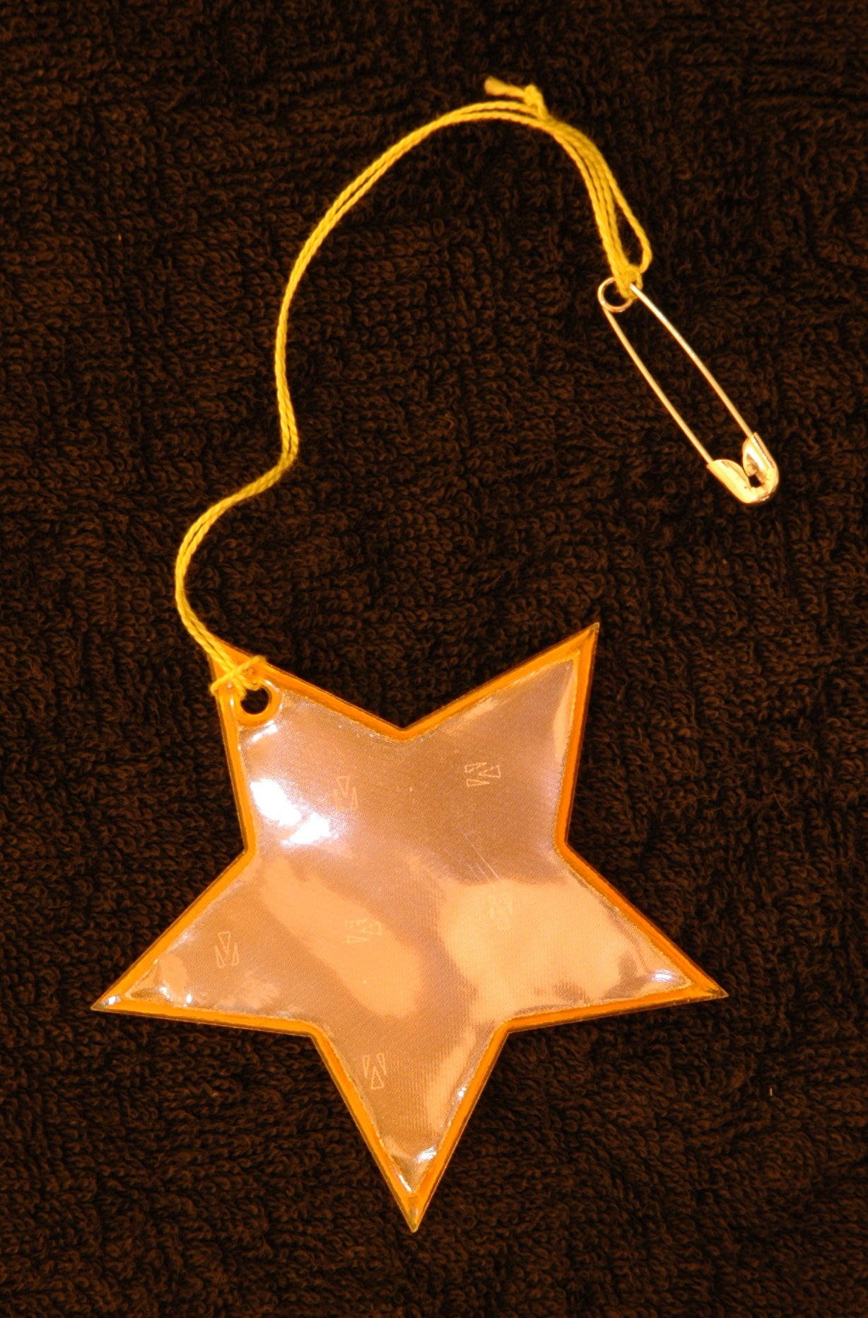 Heijastin